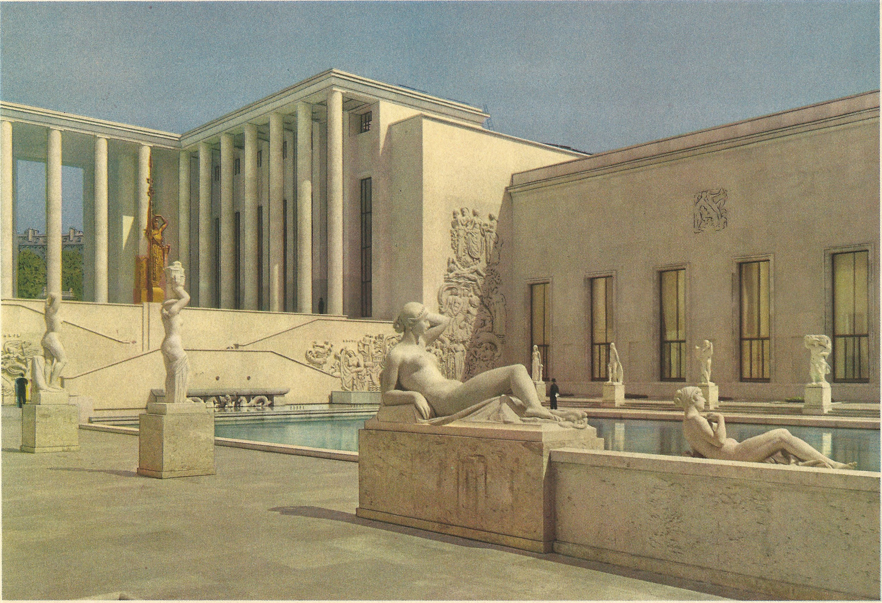 Exposition Internationale des Arts et Techniques dans la Vie Moderne (Paris-1937) , le musée d'art moderne.